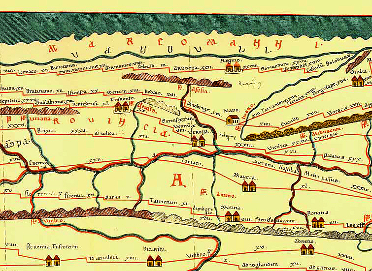 Ausschnitt aus der Tabula Peutingeriana mit Abusina als ARUSENA oben Mitte zwischen CELEUSUM (Pförring) und REGINO (Regensburg)